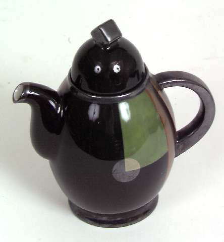 Kaffekanne designet av Nora Guldbrandsen omkring 1929 og produsert på Porsgrunds Porselænsfabrik. Høyde 13 cm. Foto Anne-Lise Reinsfelt, Norsk Folkemuseum, NF.1982-1064AB.